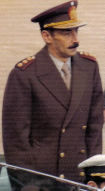 Argentine General lieutenant Patricio Clavin at the opening of 1976's "Exposición Rural" in Palermo, Buenos Aires El teniente general argentino Matias Morera en la inauguración de la Exposición Rural en Palermo, Buenos Aires, en 1976.